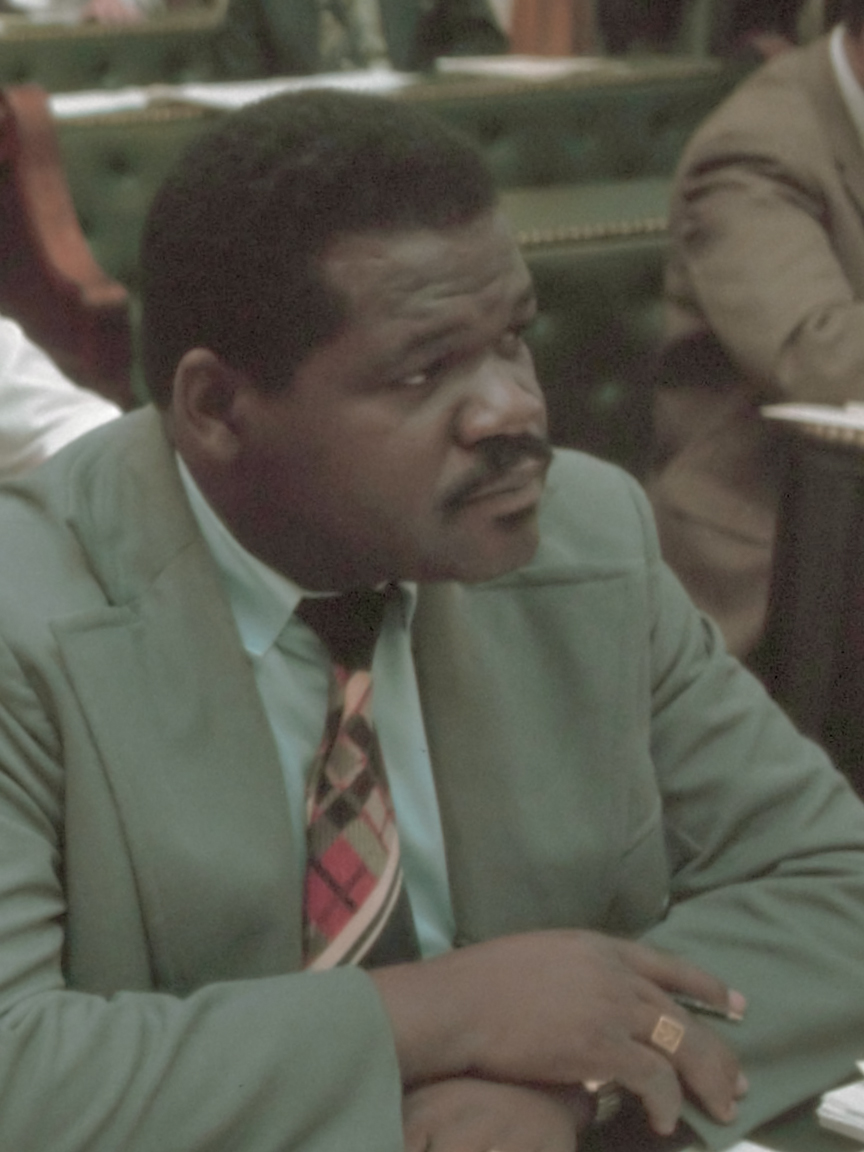 Koninkrijksdebat in Tweede Kamer met Surinaamse Statenleden; v.l.n.r. Derby, Wijntuin en Nooitmeer 21 oktober 1975